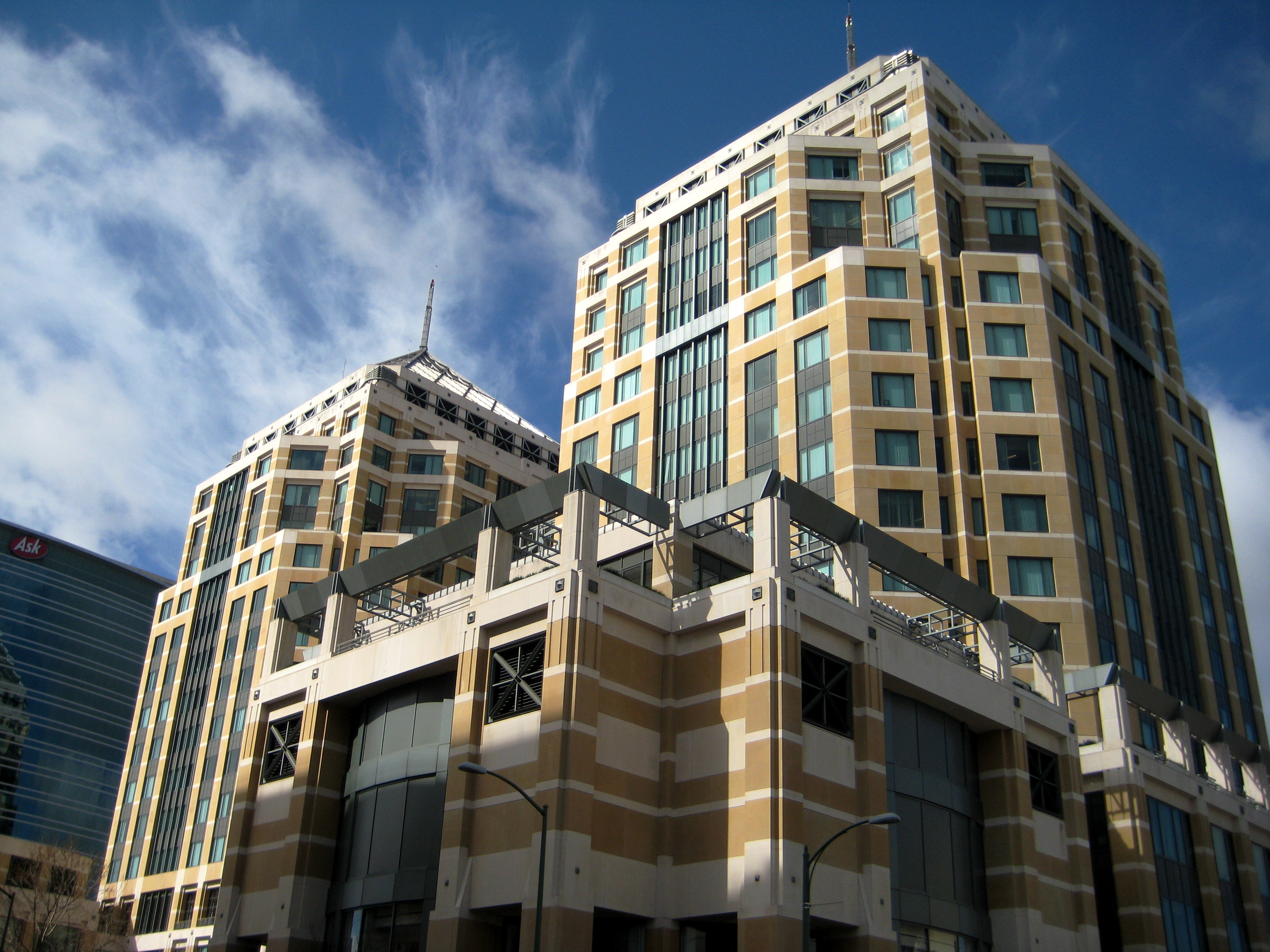 Ronald Dellums Federal Building